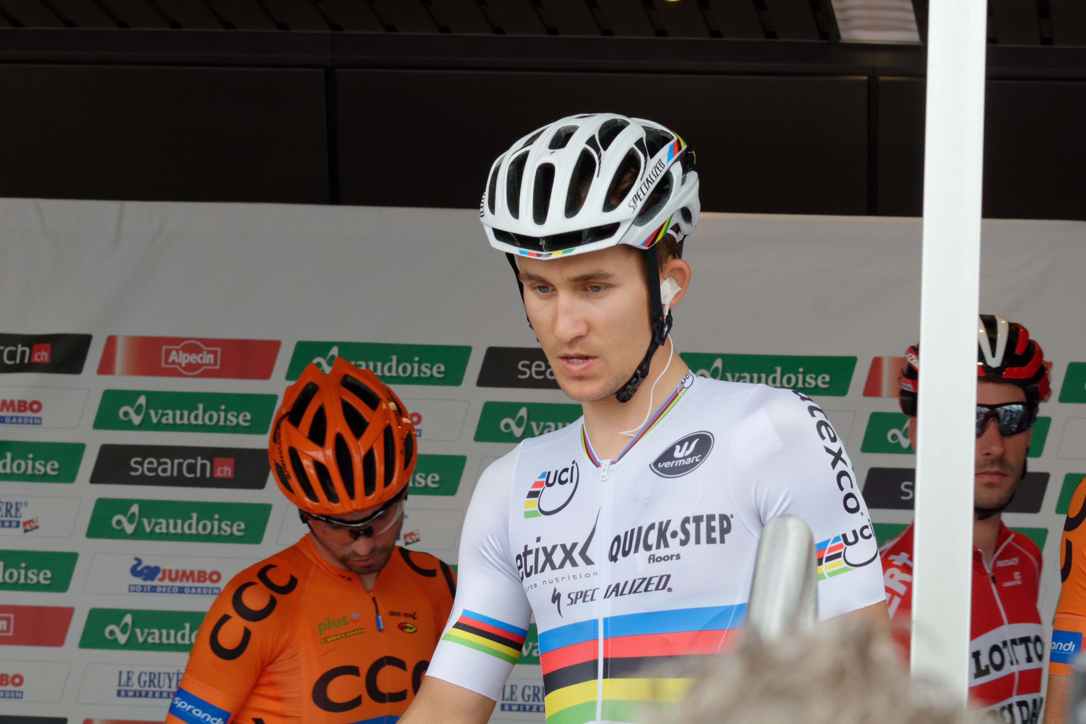 D71_9938_DxO